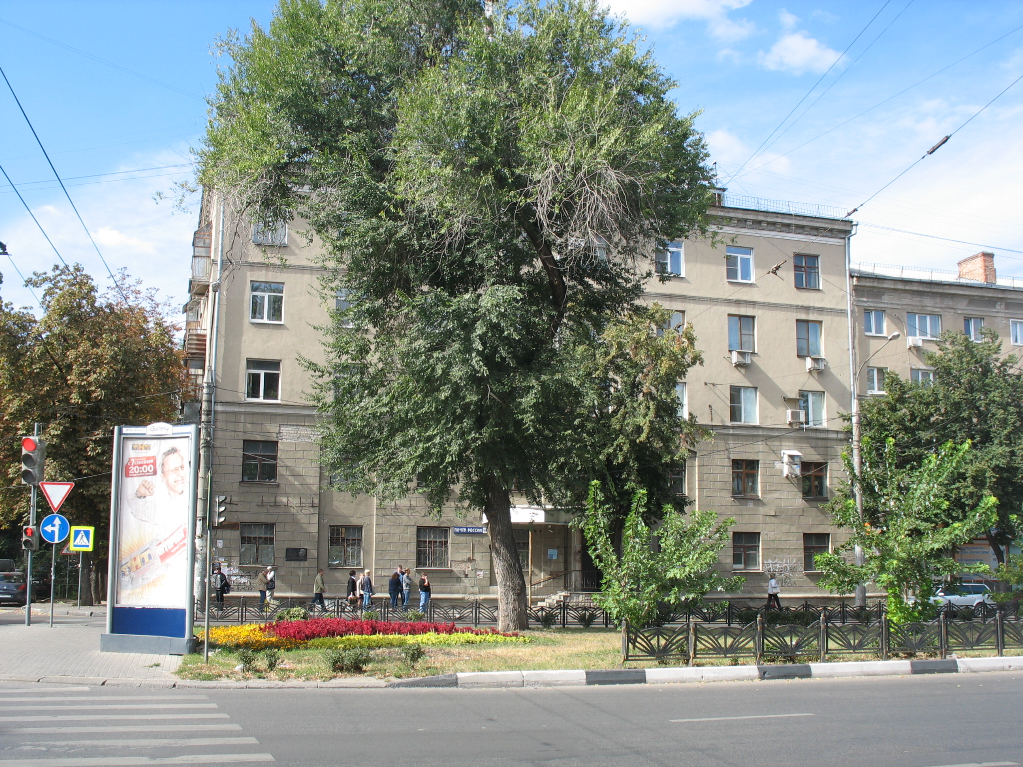 Дом, в котором жил композитор К. И. Массалитинов: улица Комиссаржевской, 16, Воронеж, Воронежская область